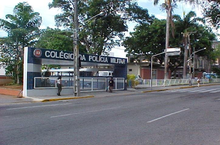 Foto do CPM